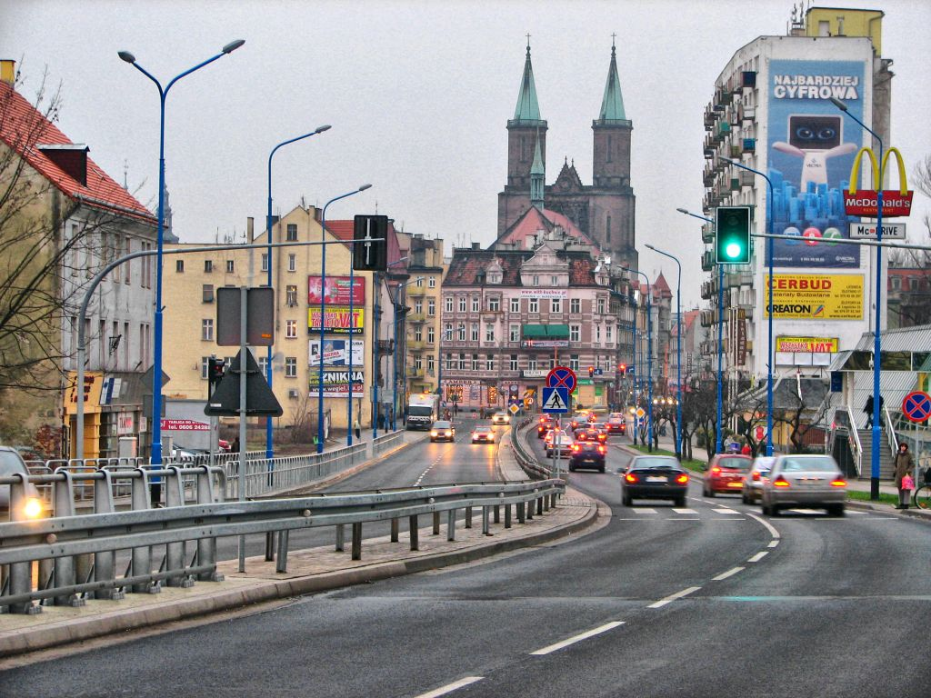 ul. Wrocławska - Legnica - 2009